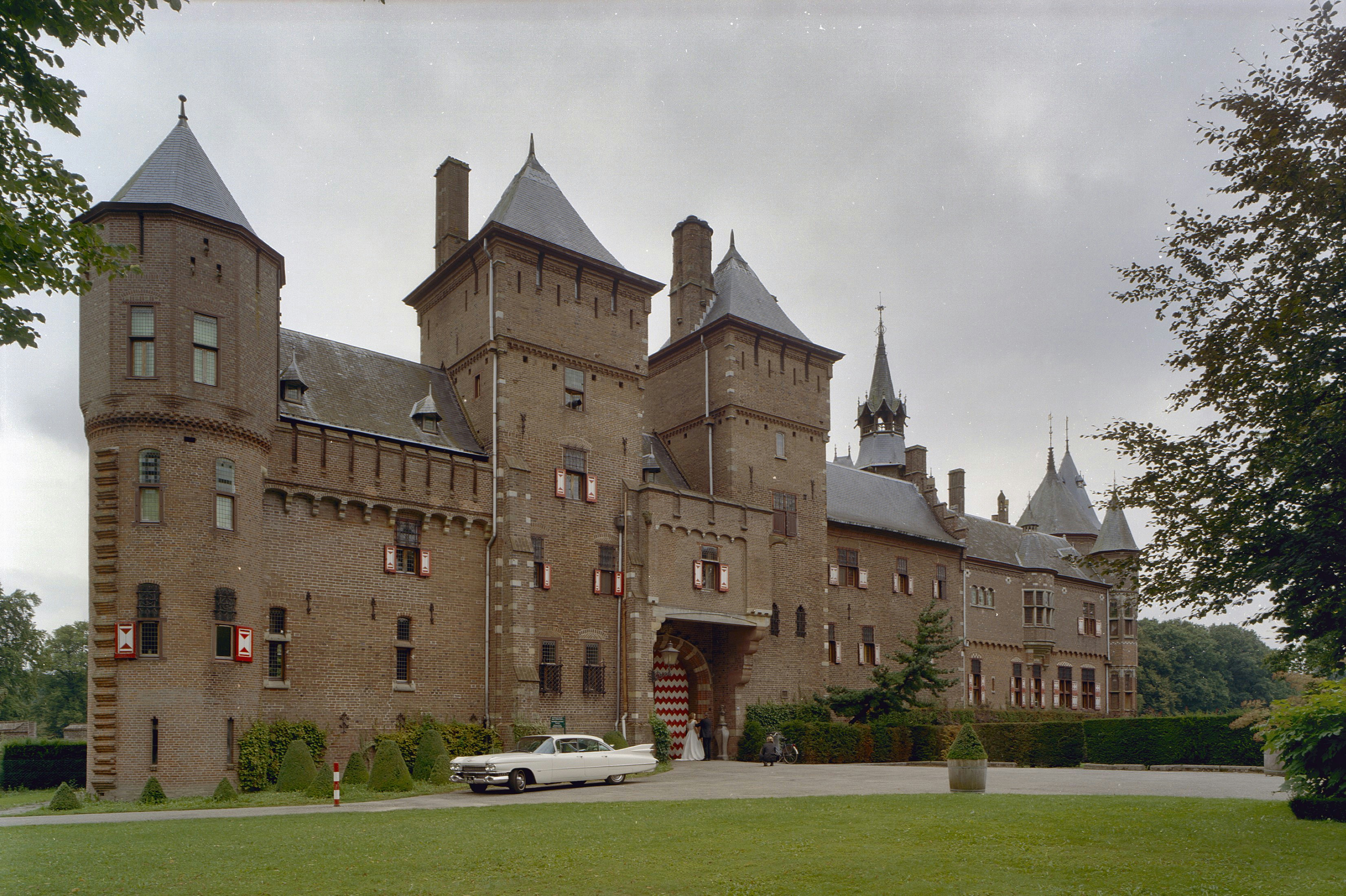 De Haar: Exterieur Chatelet, overzicht voorgevel